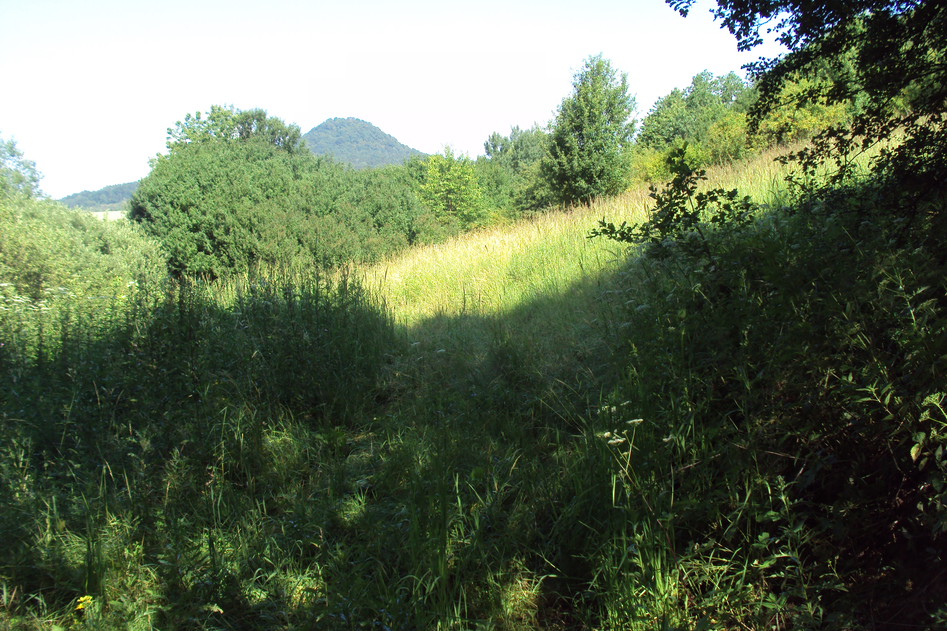 Přírodní památka Pod Hvězdou na Českolipsku, v pozadí kopec Ronov